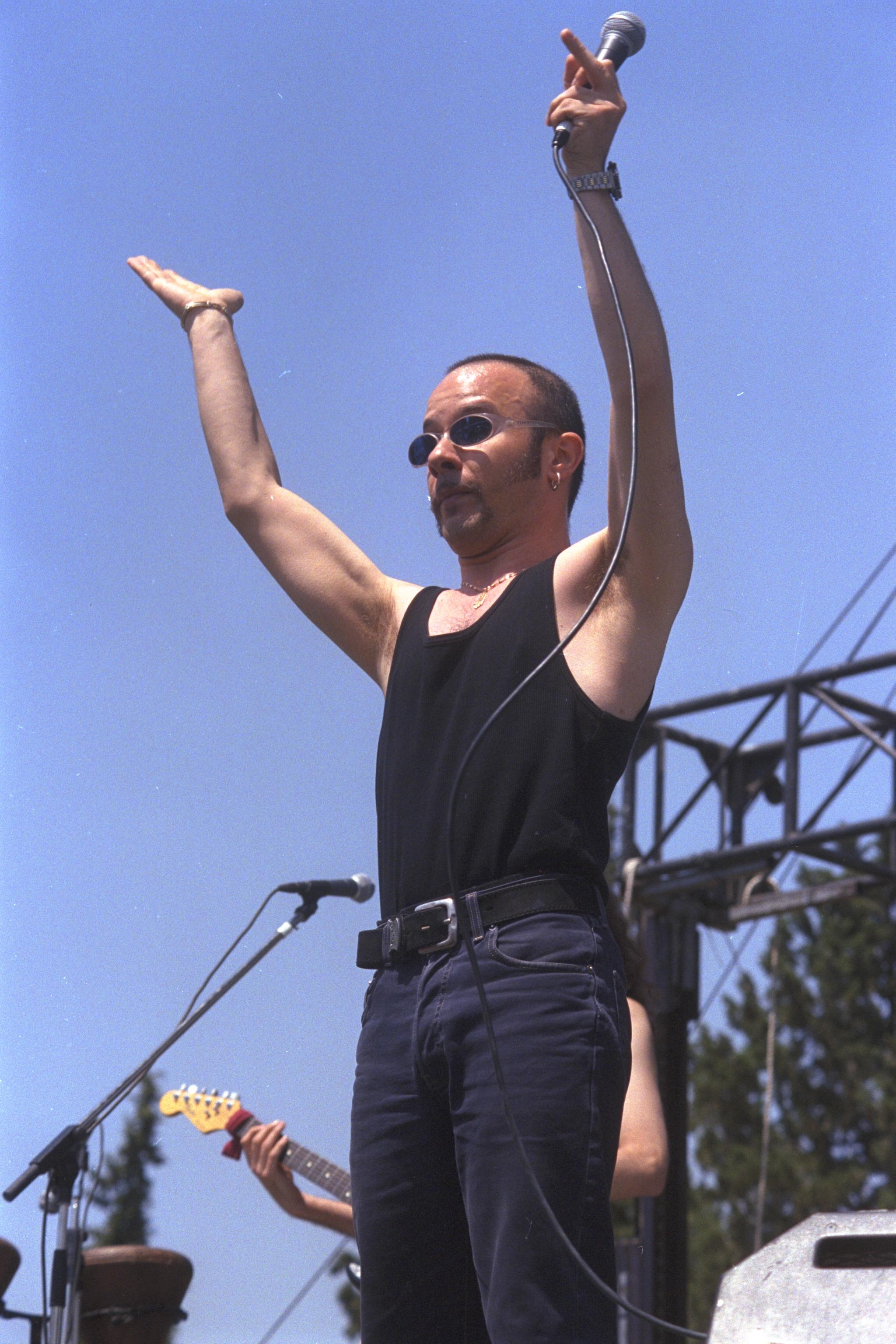 A performance by the band TIPEX during Students Day at the Hebrew University of Jerusalem. In the photo: lead singer Kobi Oz. הופעה של להקת טיפקס ביום הסטודנט של האוניברסיטה העברית בירושלים. בתמונה: זמר הלהקה, קובי עוז Photo: EINAT ANKER, 05/21/1997